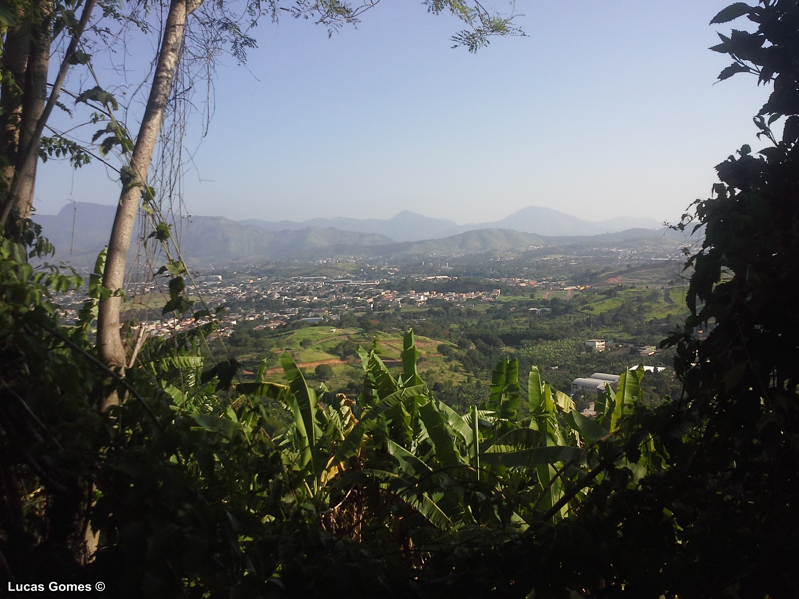 Passeio na Serra